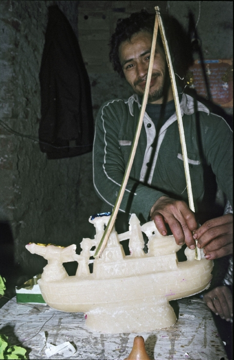 Dia uit een serie foto's die is gemaakt bij de aankoop van een aantal suikerwerkfiguren en mallen om suikerwerkfiguren in te vervaardigen (4635-18*/63). Suikerwerkfiguren worden aan kinderen kado gegeven bij de viering van mawlid an-nabi. Op deze dag wordt de verjaardag van de profeet Mohammed gevierd. Mawlid an-nabi wordt in Cairo gevierd met een kermis, optochten en soefi-ceremonies. De viering komt overeen met de mawlids van islamitische en Koptische heiligen in Egypte. De suikerwerkfiguren zijn het hele jaar door verkrijgbaar, maar worden vooral voor mawlid an-nabi verkocht. Ouders geven de suikerwerkfiguren kado aan hun kinderen. De traditionele verdeling was dat de jongens een boot kregen en de meisjes een pop. Andere figuren waren zowel voor jongens als meisjes bedoeld. Tegenwoordig is deze traditionele verdeling enigszins losgelaten.